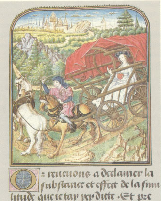 Kobelwagen, Miniatur von Jean Le Tavernier. Brüssel, nach 1455. Bibliothèque Nationale Paris